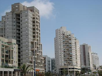 רבי קומות בשכונת הסיטי באשקלון.